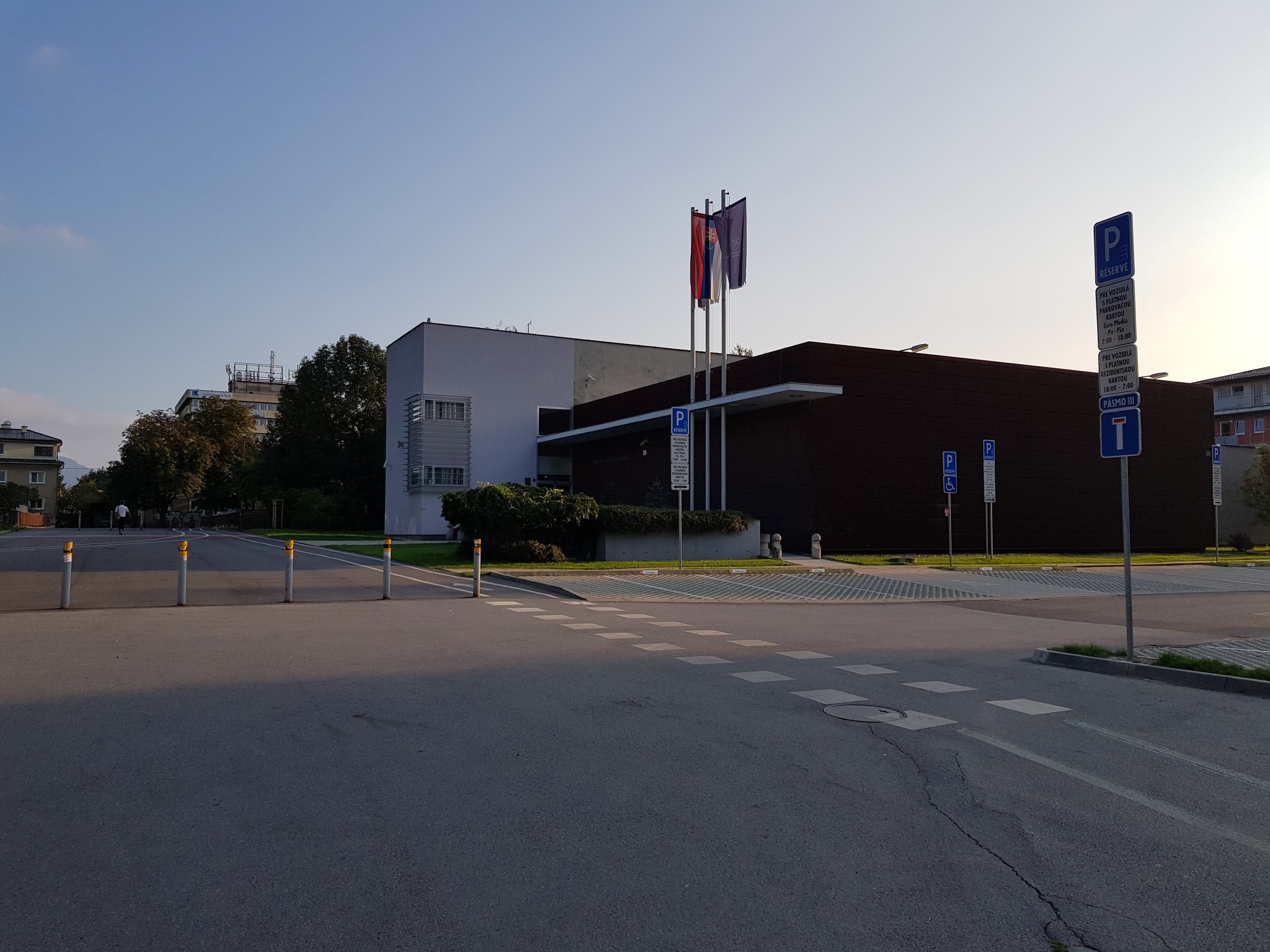 Expozitúra NBS v Žiline